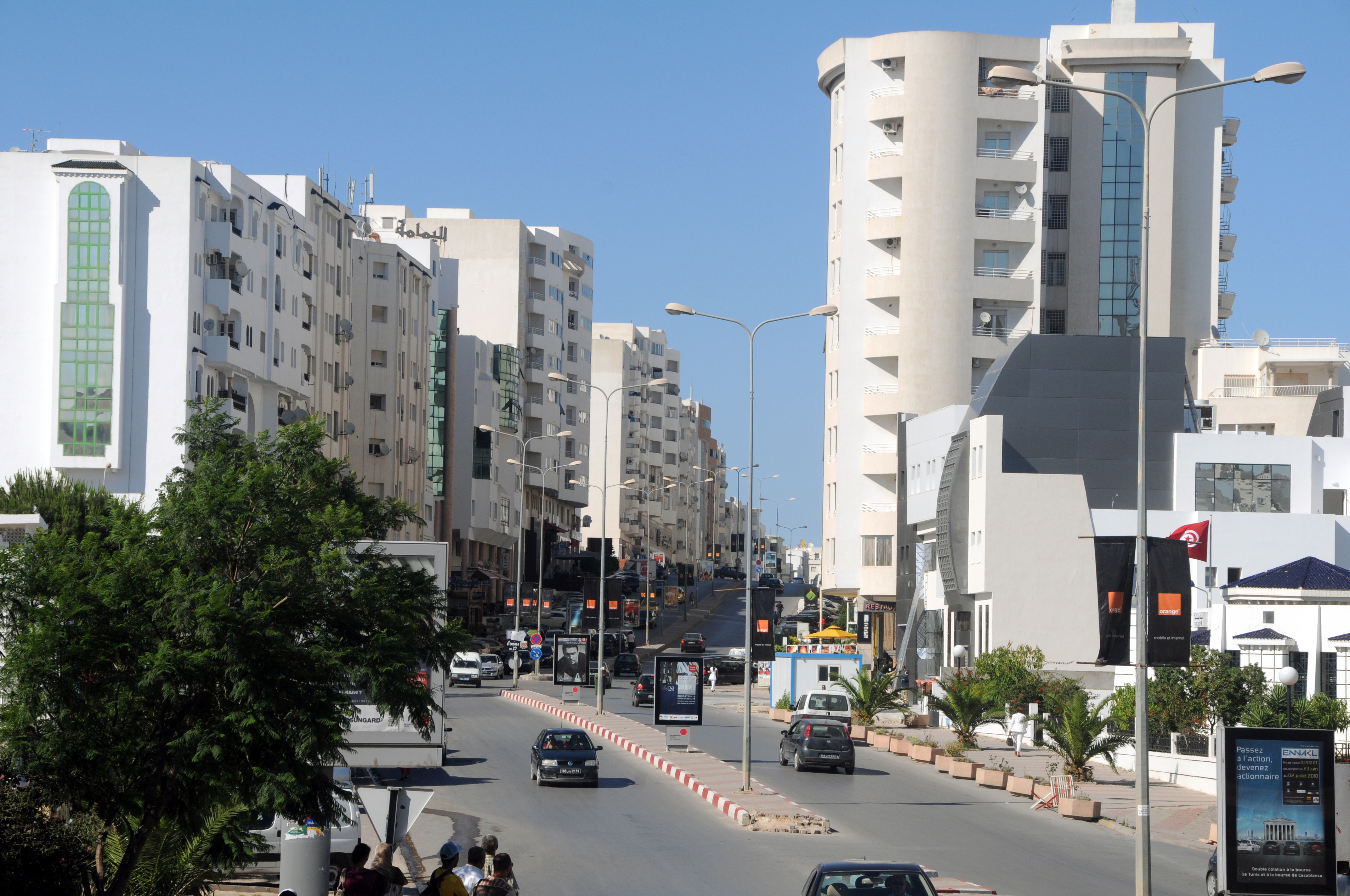 Avenue Hédi Nouira à la cité Ennasr dans la banlieue de Tunis.